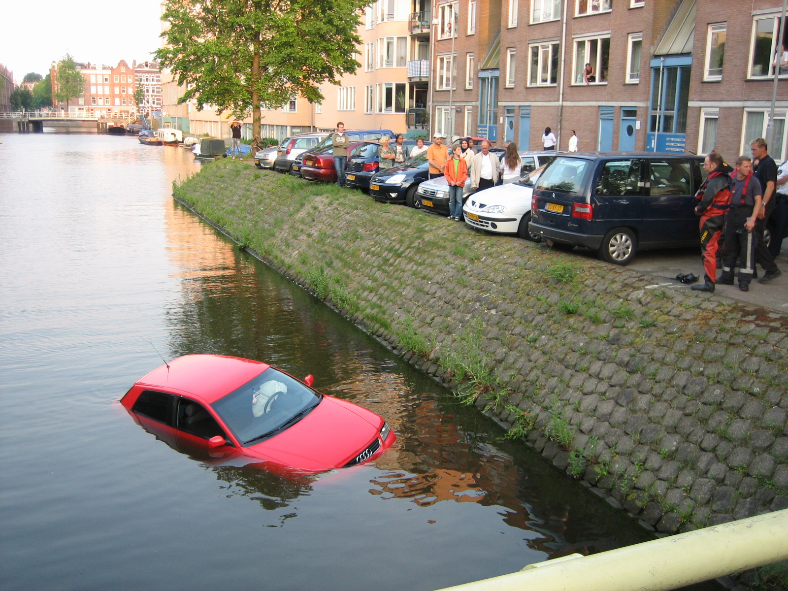 Auto te water in de Le Mairegracht, Amsterdam (1 juni 2007) Experimental amphibious car;)